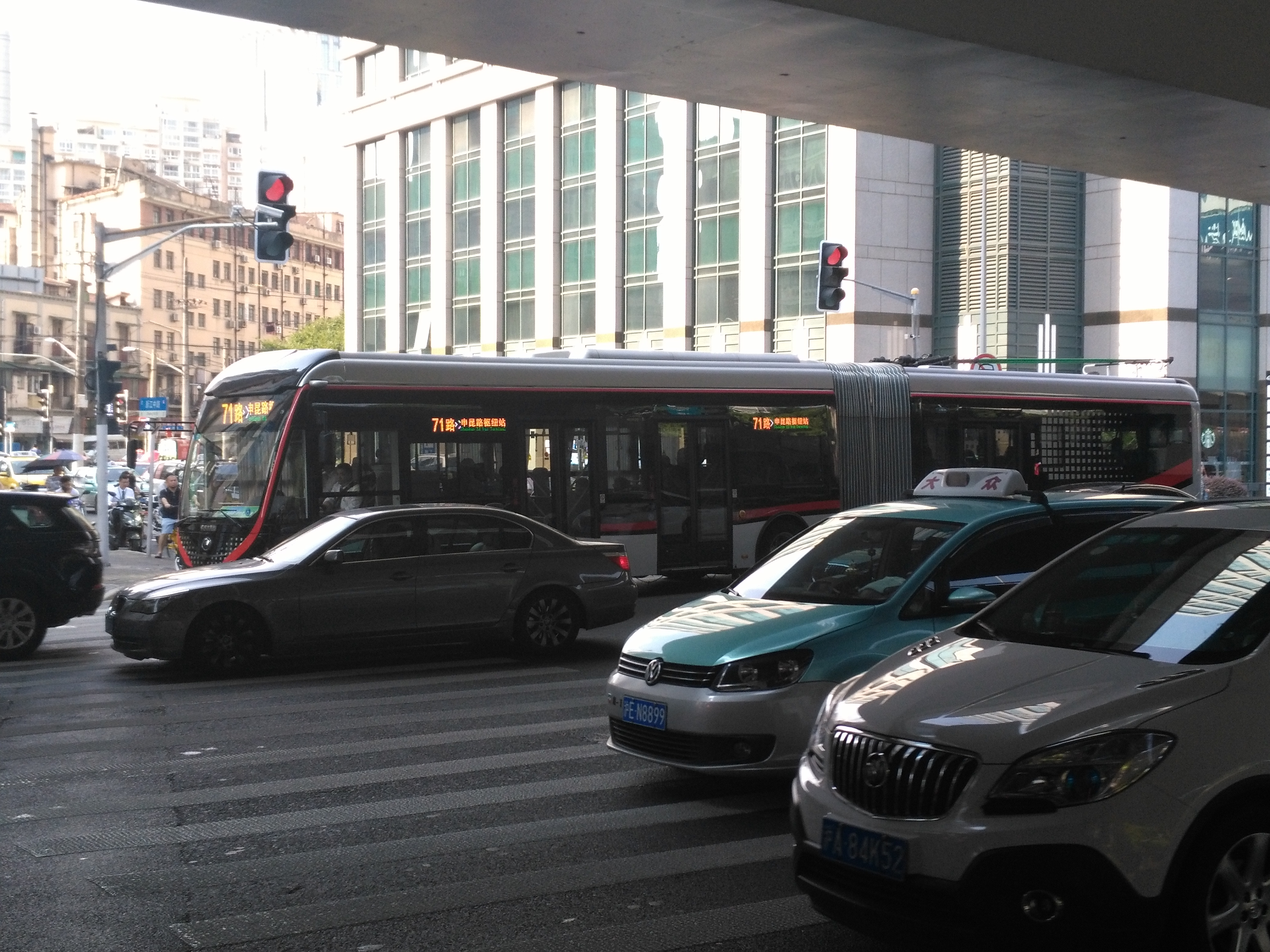 中文（中国大陆）: 在中运量公交系统非专用道路段，公交车与社会车辆混行。